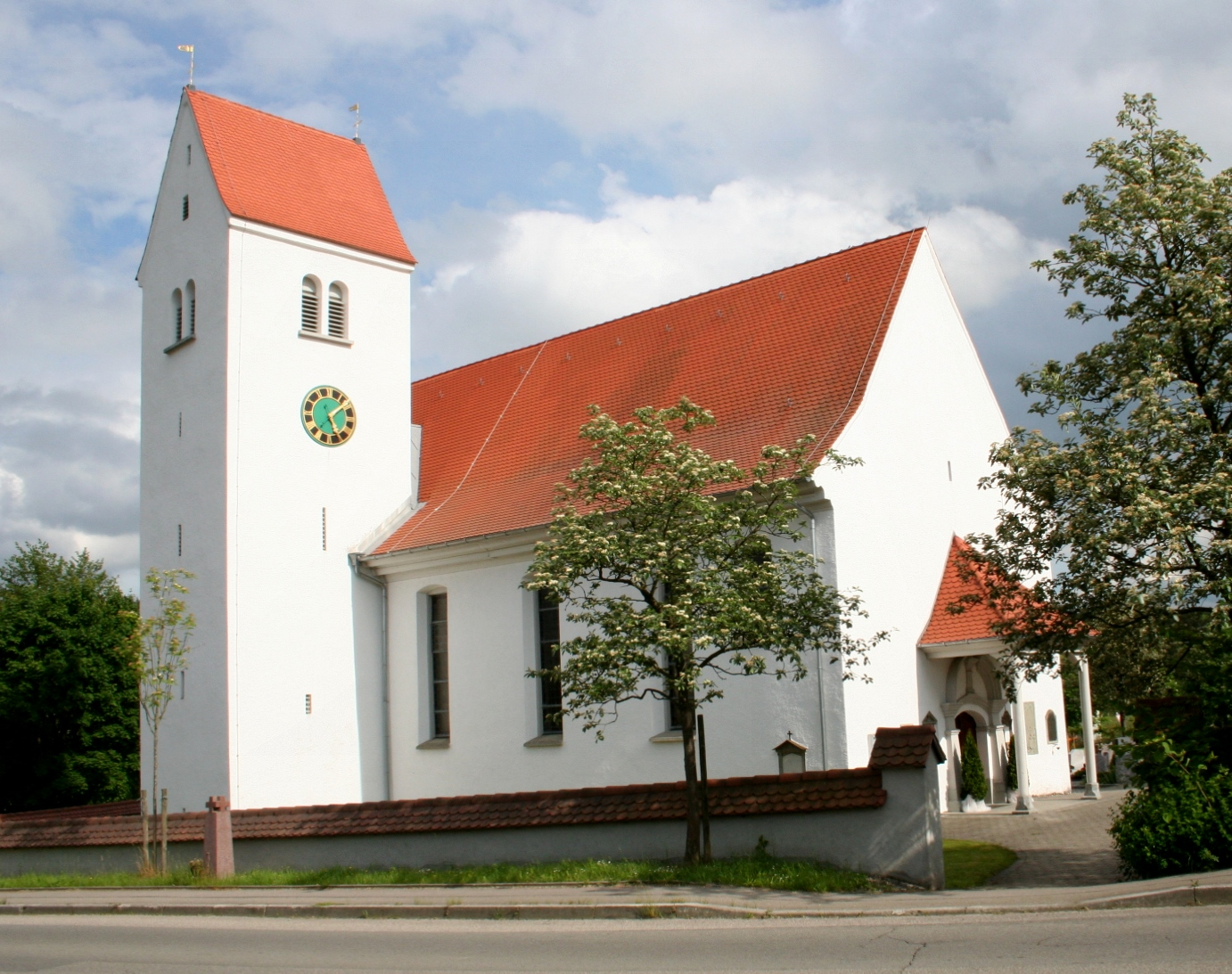 Pfarrkirche St. Martin in Tettnang-Tannau